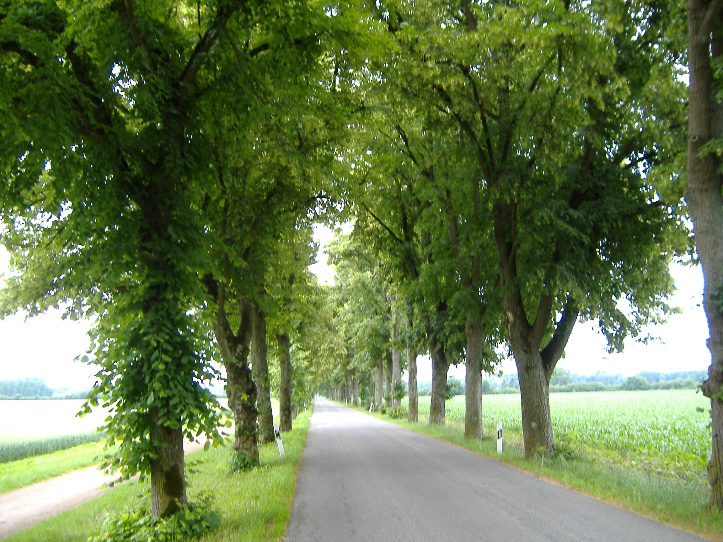 Lindenallee bei Schloss Wellenburg